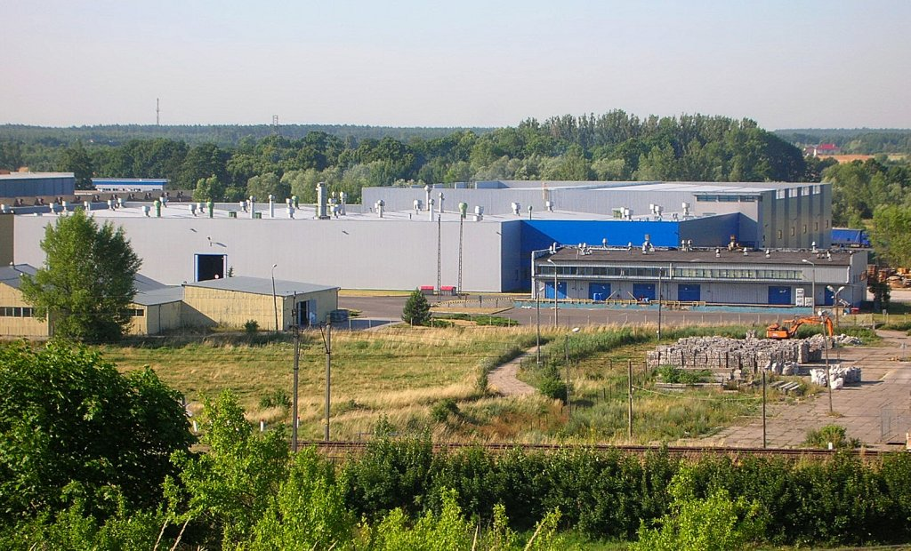 Przedsiębiorstwo w "dzielnicy przemysłowej" na Osowej Górze w Bydgoszczy